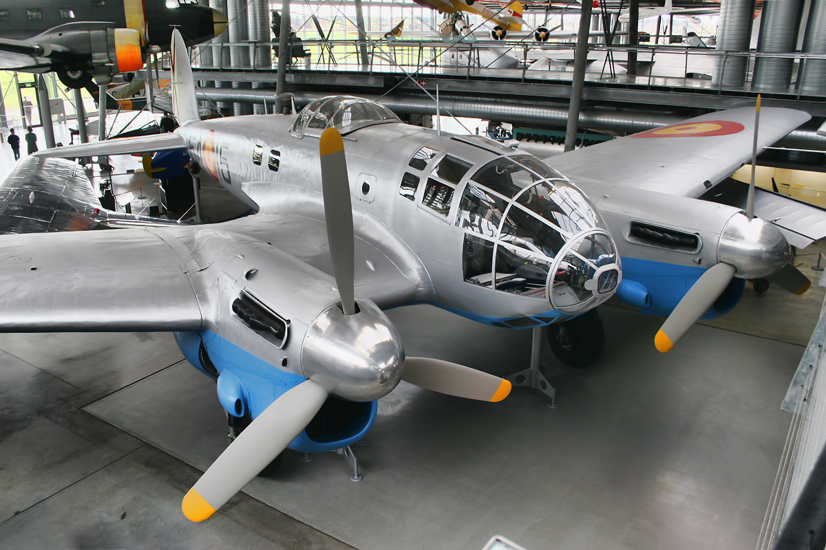 Oberschleißheim Aviation Museum